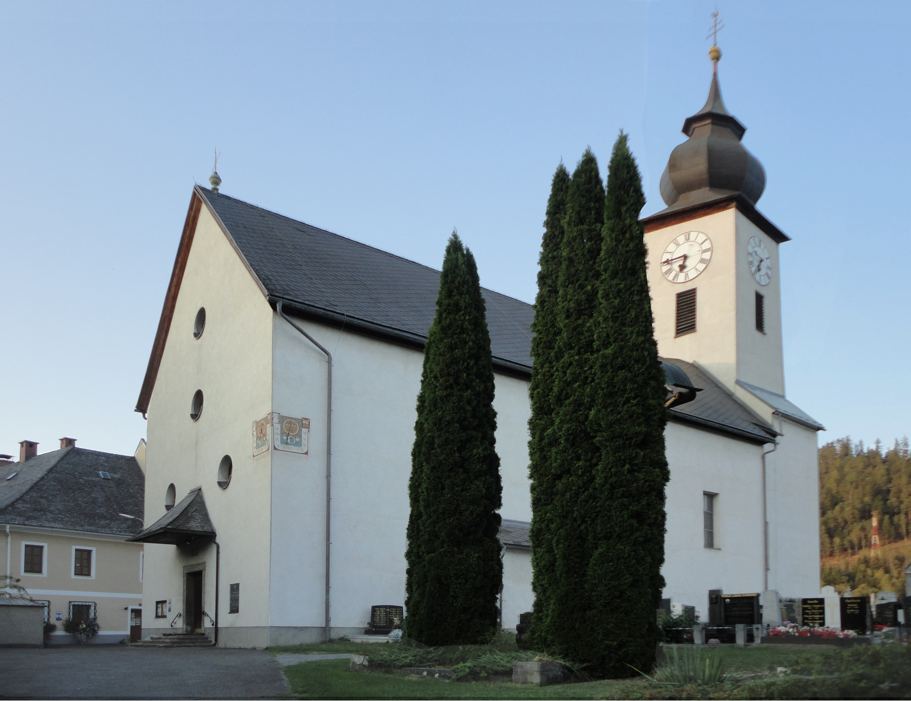 Kath. Pfarrkirche hl. Michael und Friedhof